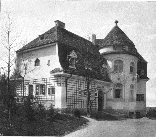 Summer Residence Gaaden_Skoda